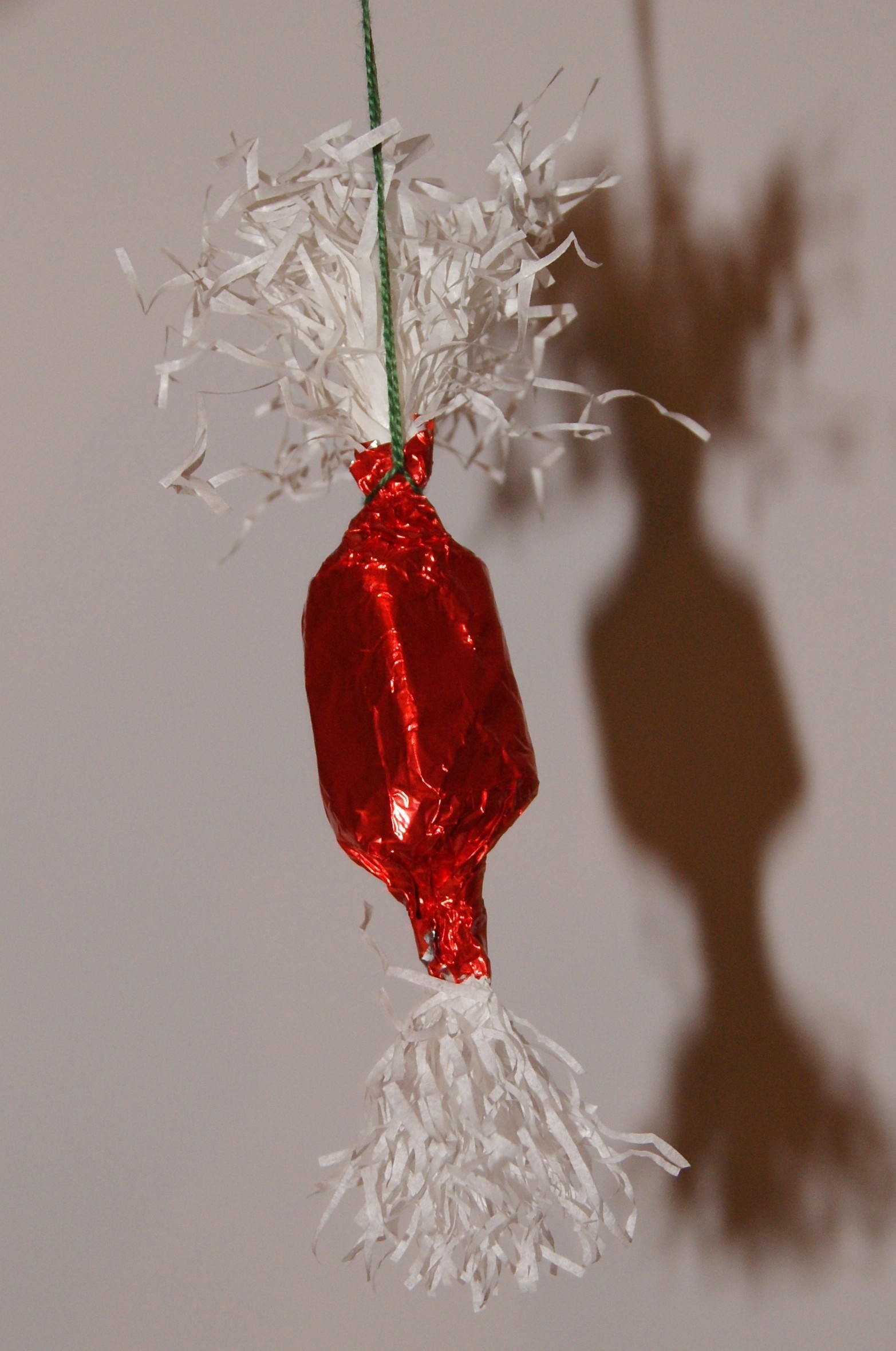 Ozdoba choinkowa wykonywana ręcznie na Boże Narodzenie